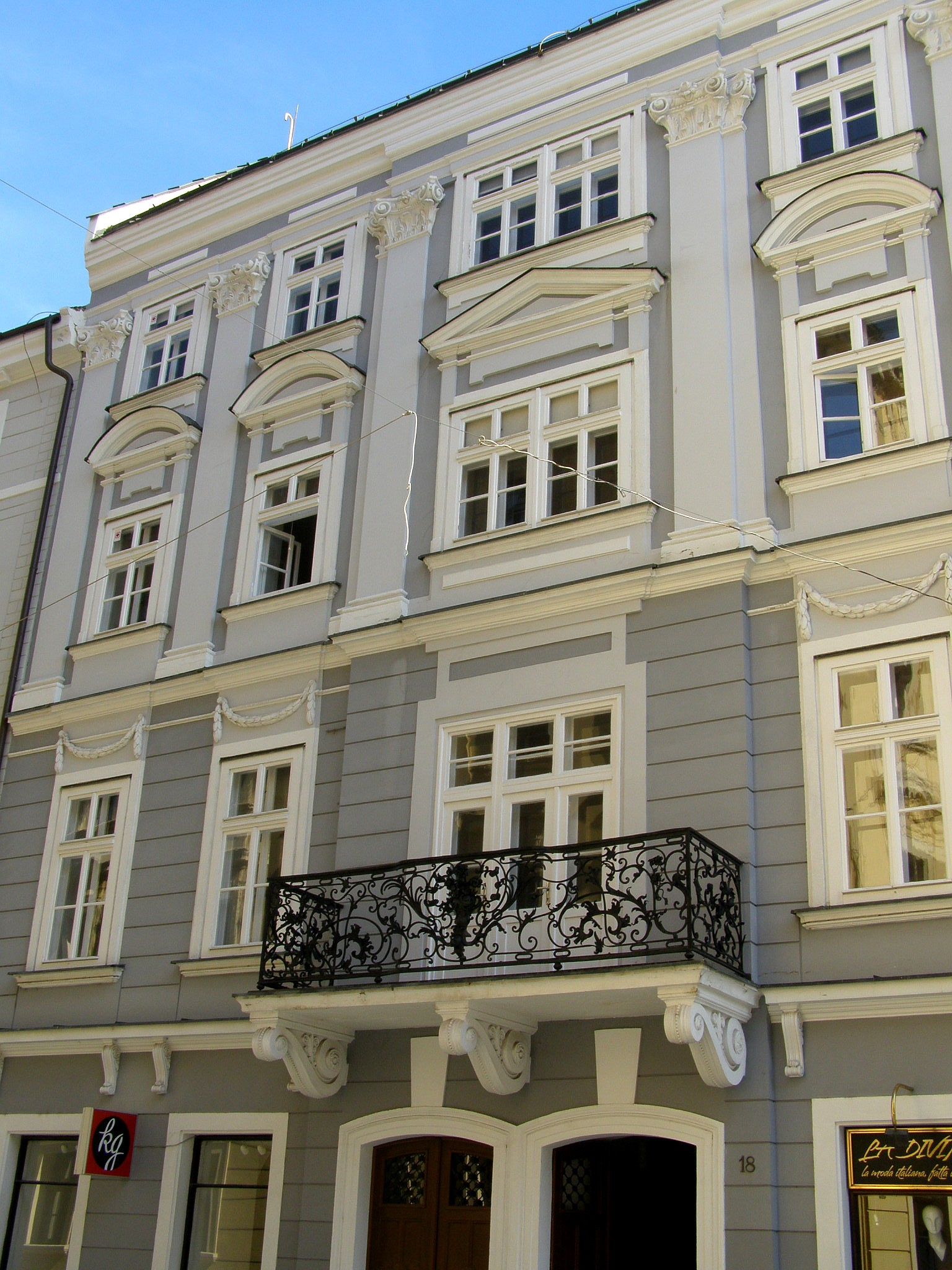 Ventúrska ul. č. 18. Péterffiho palác